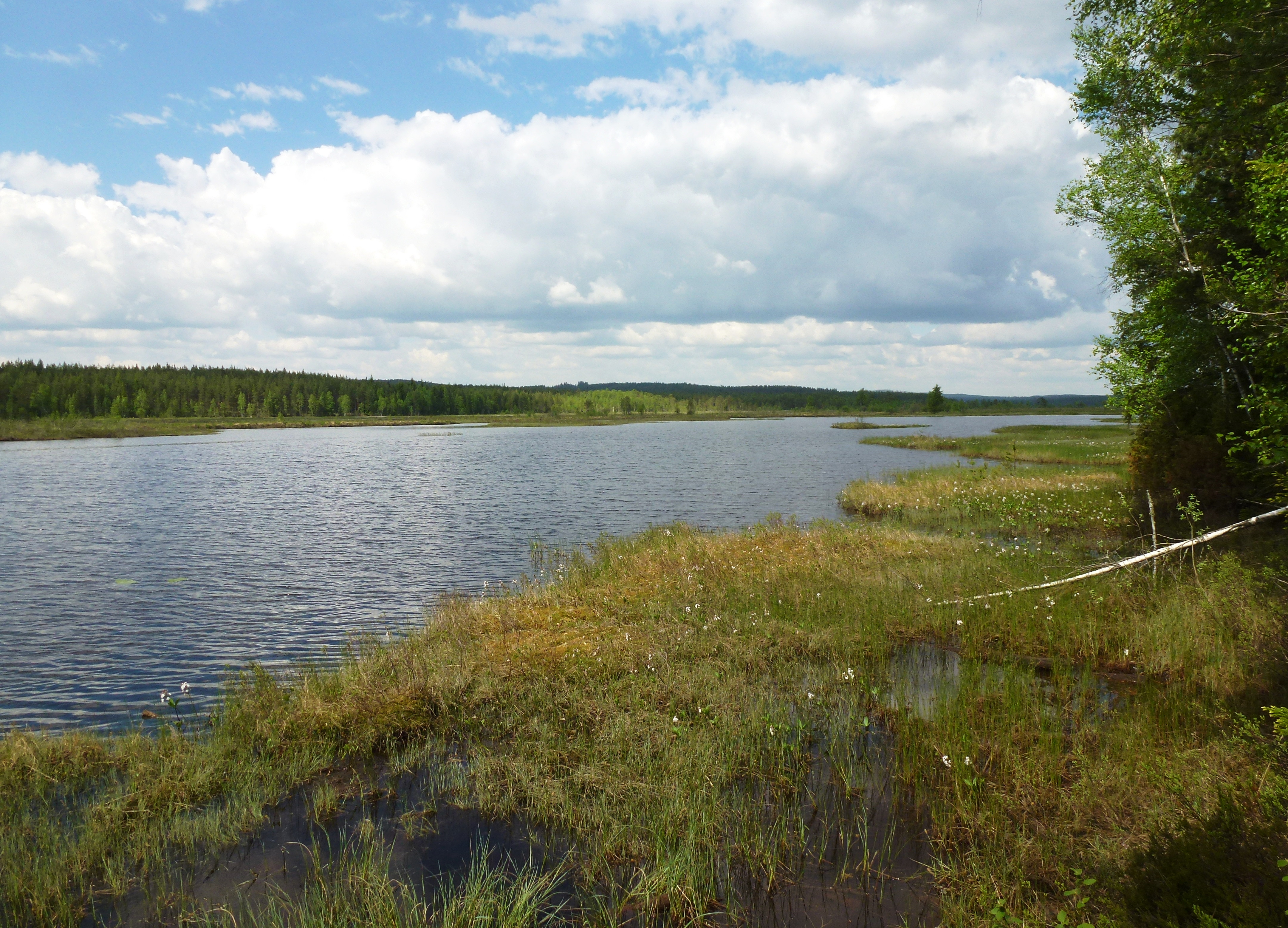 Burån Ludvika Kommun